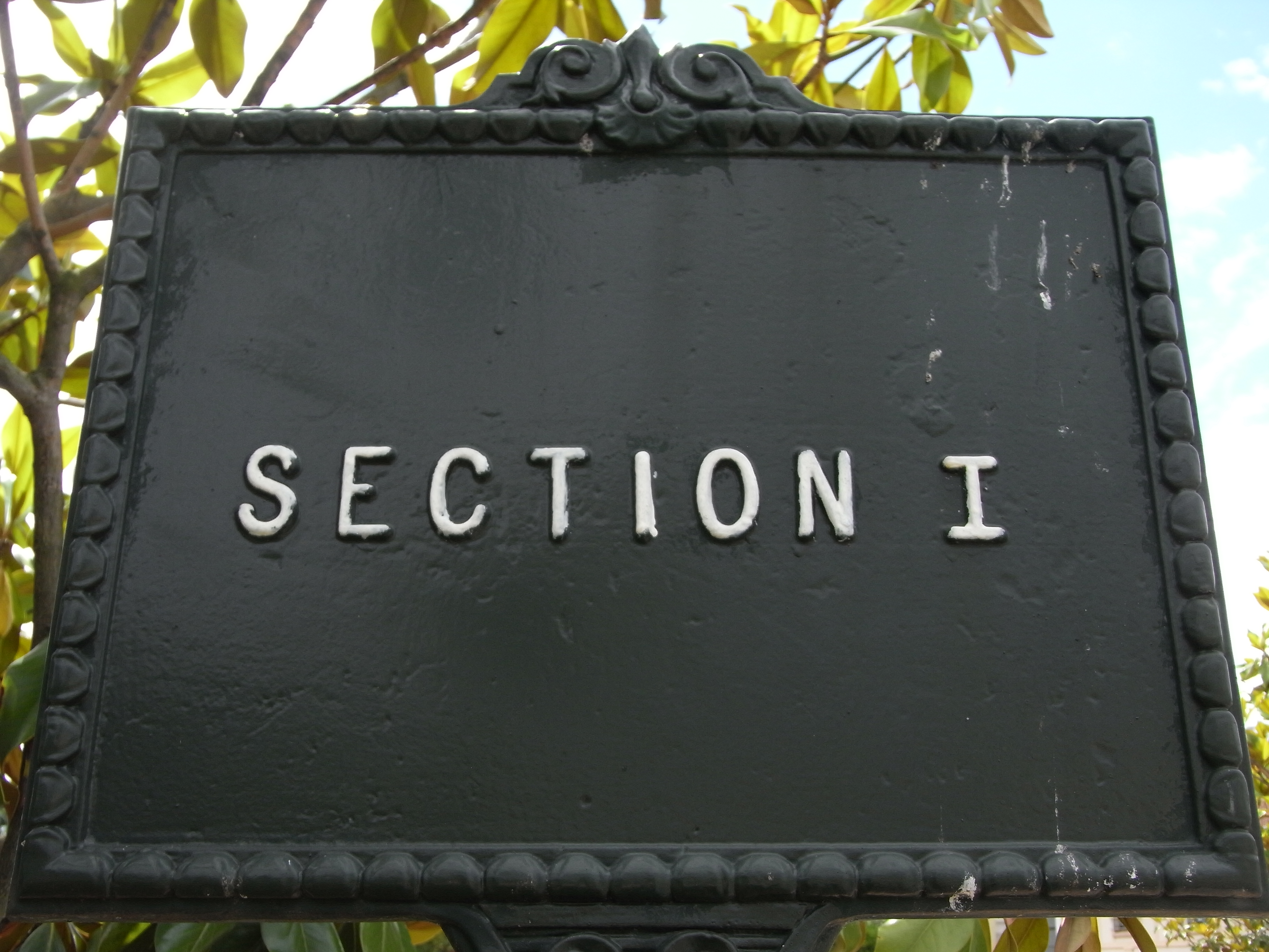 Section I, ancien cimetière de Puteaux, Hauts de Seine, France.